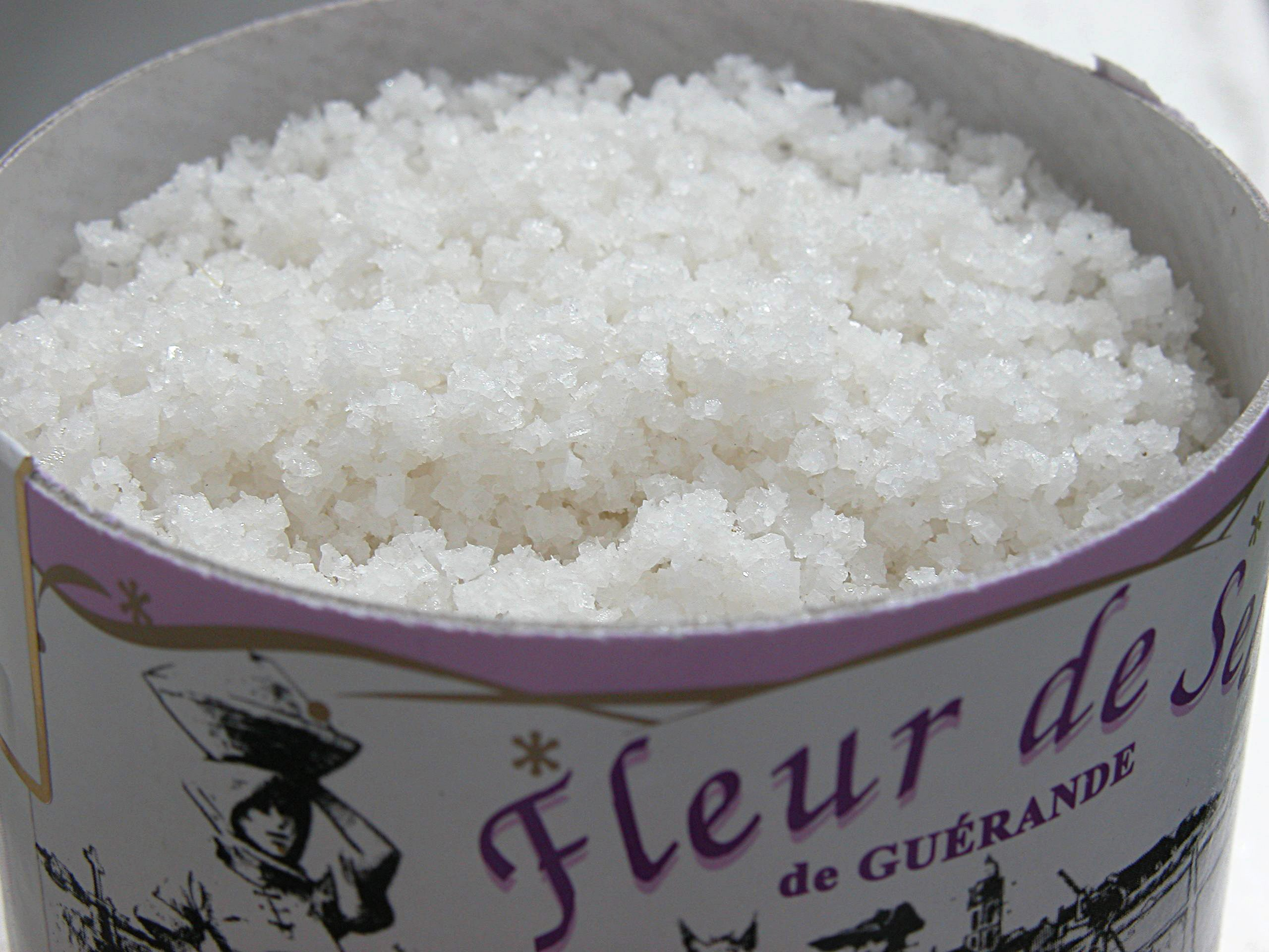 Fleur de Sel sea salt from Guérande, France in its original box